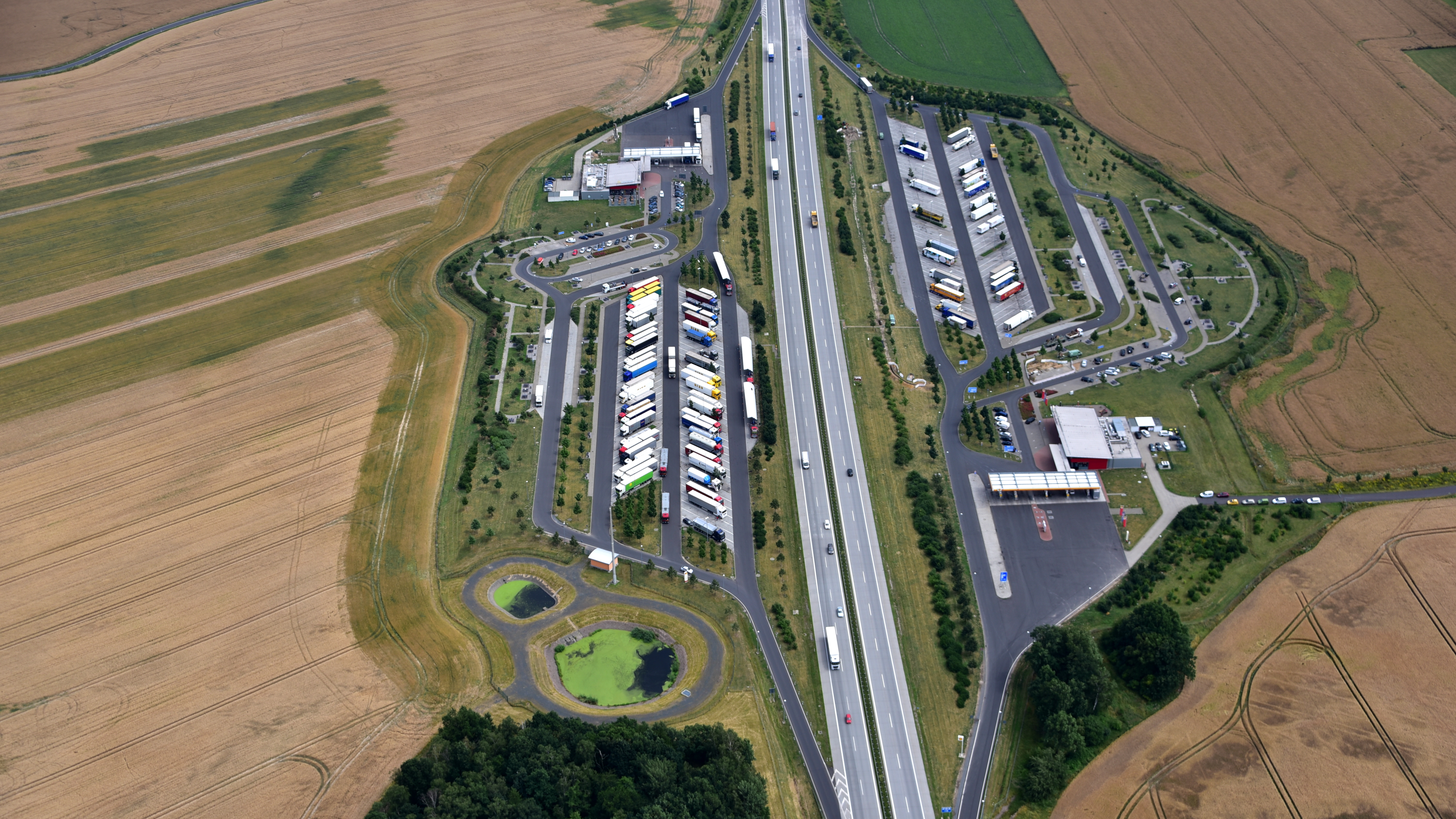 Bundesautobahn A14, Raststätte Muldental, Luftaufnahme (2017)